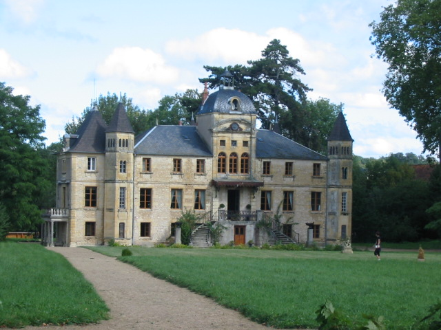 Château du Four du Vaux, à Varennes-Vauzelles